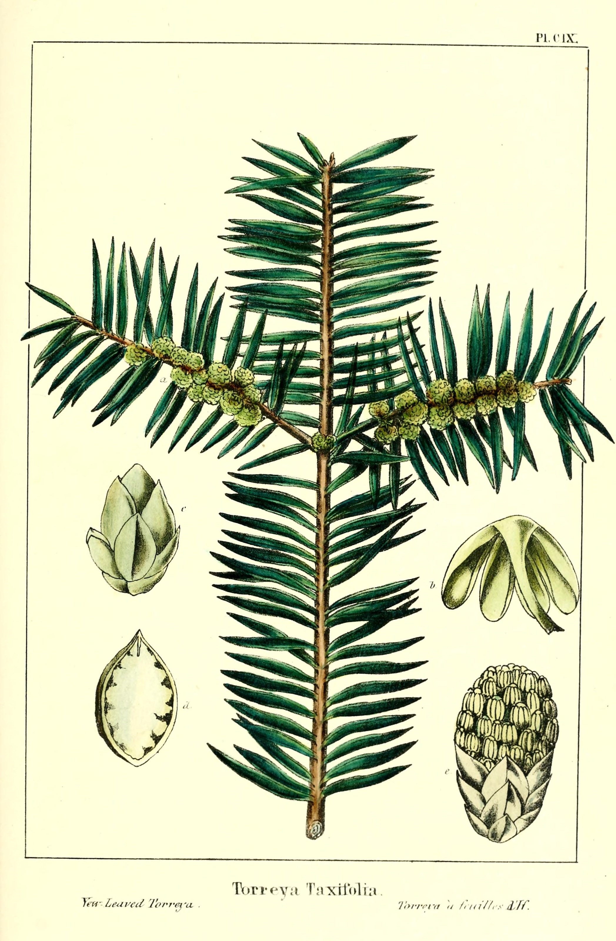 ri.cix. Teu' Leut'cd Torrei-u . ' 'Jlyrrnyi 'u /J /a'//, y tilf.